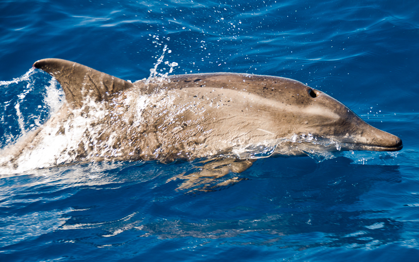 Steno bredanesis - delfín de diente rugoso - delfín de hocico estrecho